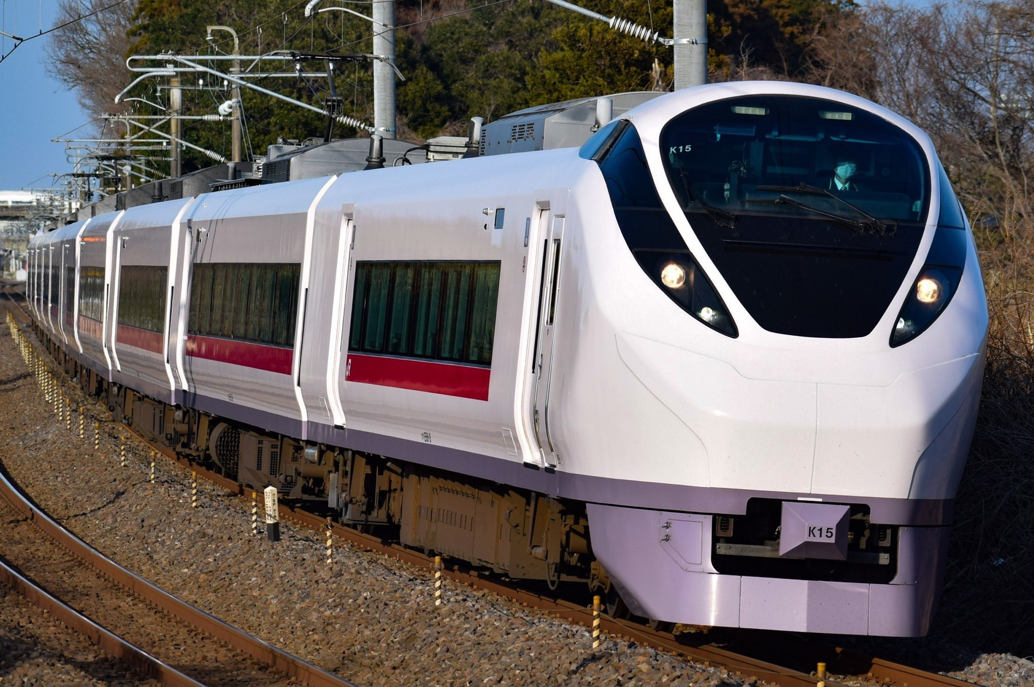 常磐線を走るE657系カツK15編成(特急ひたち号品川)